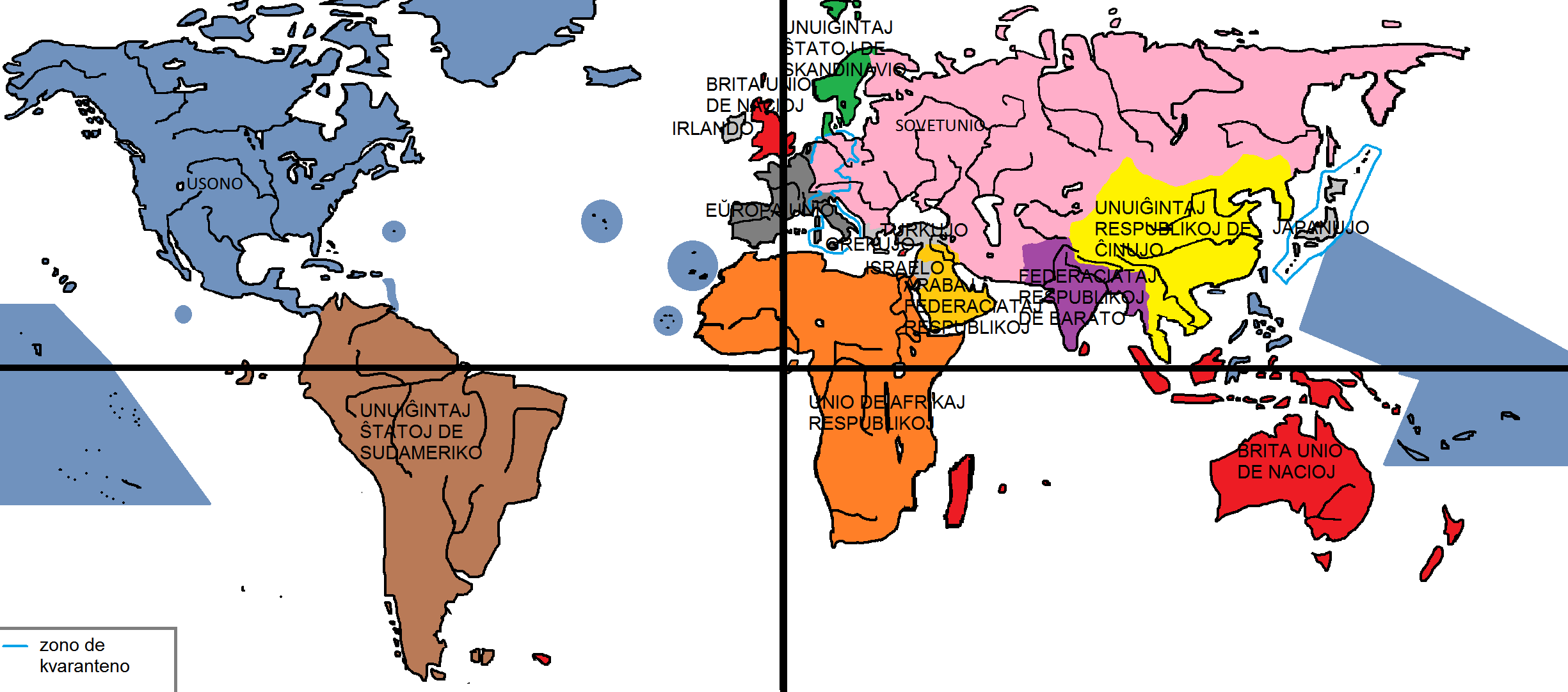 Traduko kaj simpligo de la mapo.